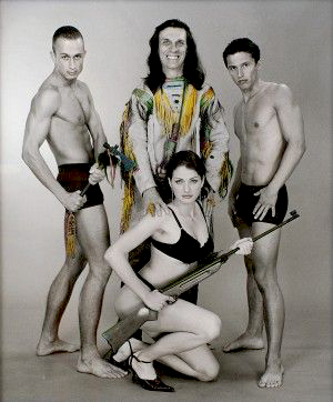 Syn lovca manželiek, fotoakcia, ručne kolorovaná fotografia